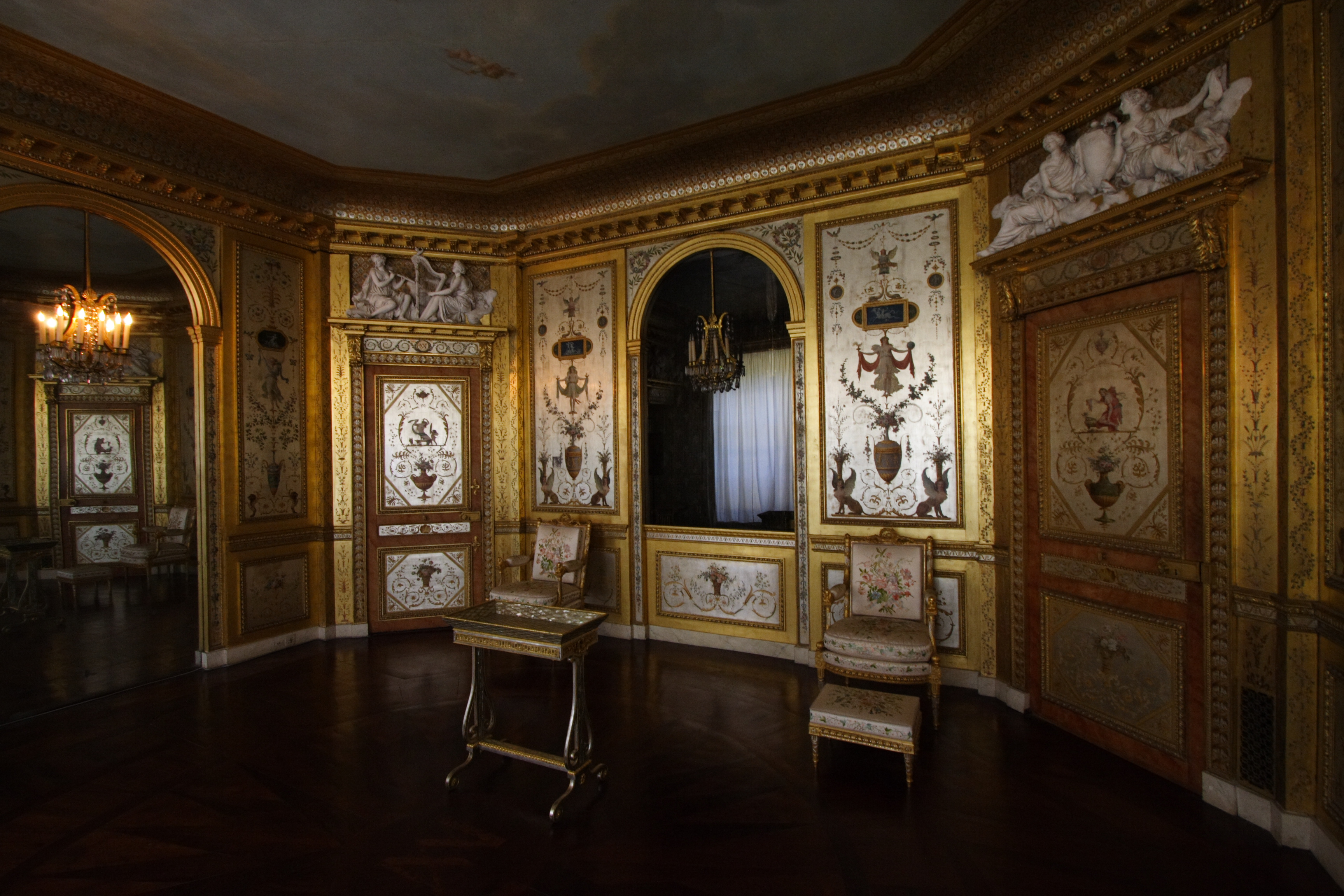 Château de Fontainebleau(Fontainebleau, France)